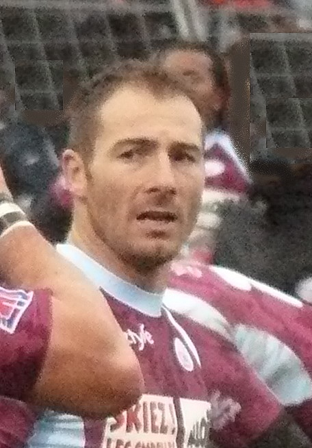 Mikaël Forest, demi de mélée du CS Bourgin-Jallieu, lors du match contre le Racing Métro 92, le 3 janvier 2010 à Colombes.